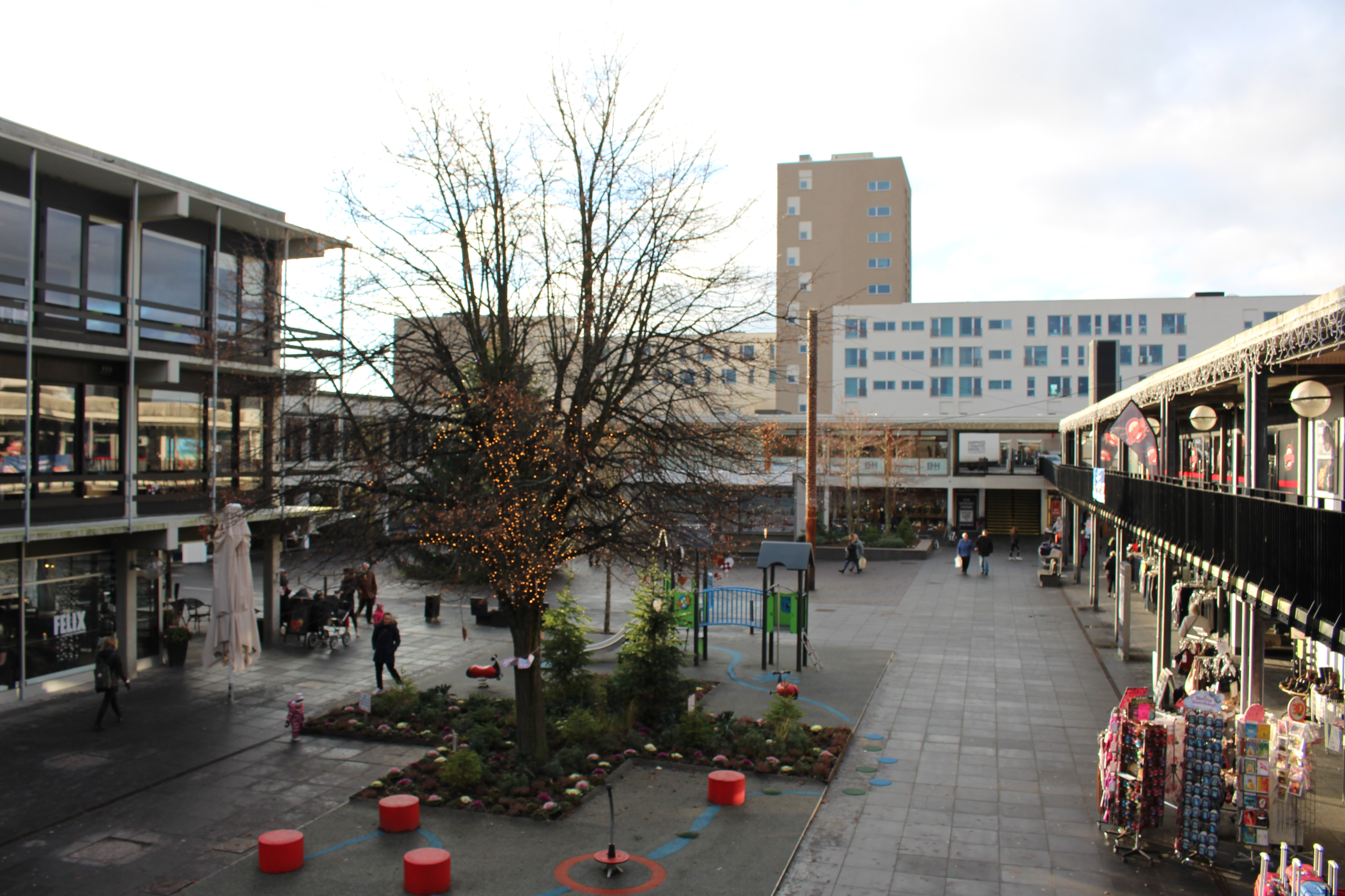 Albertslund Centrum vinter